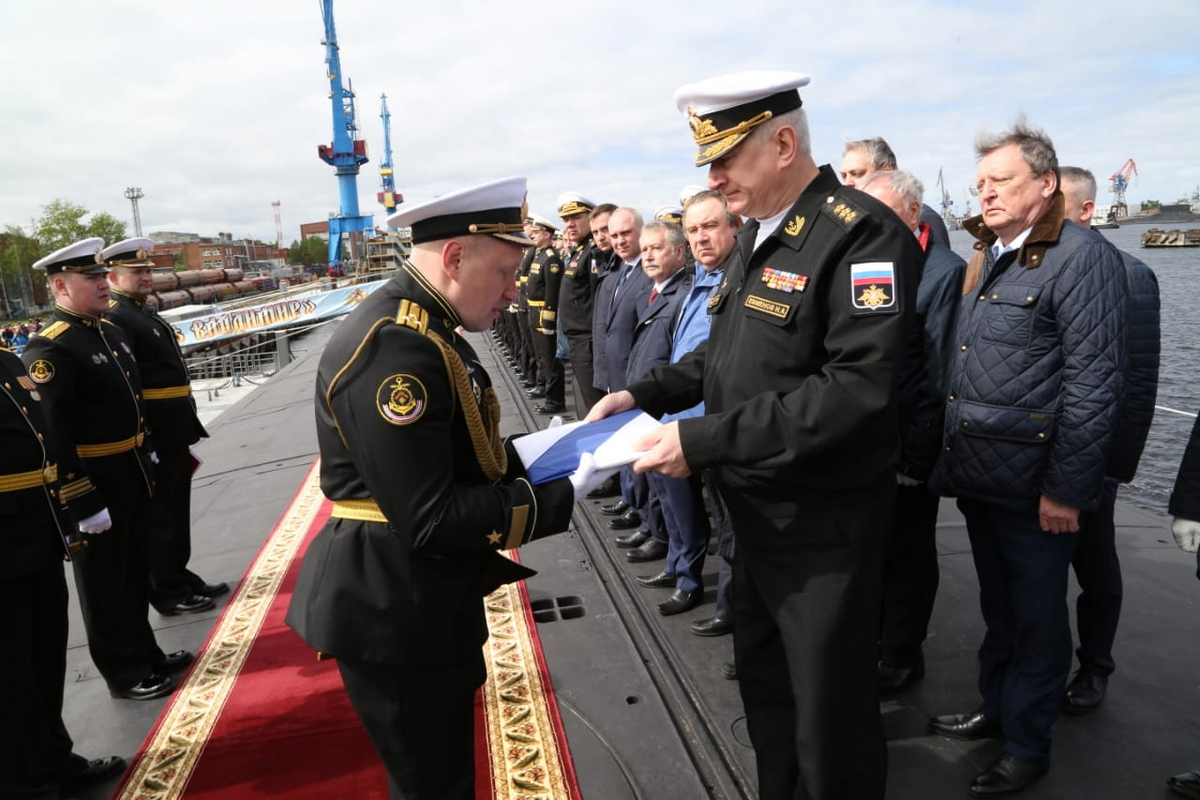 Торжественная церемония приёма в состав Военно-Морского Флота ракетного подводного крейсера стратегического назначения проекта «Борей-А» (955А) «Князь Владимир» и подъёма на нём Военно-Морского Андреевского флага. Северодвинск. АО «ПО «Севмаш».